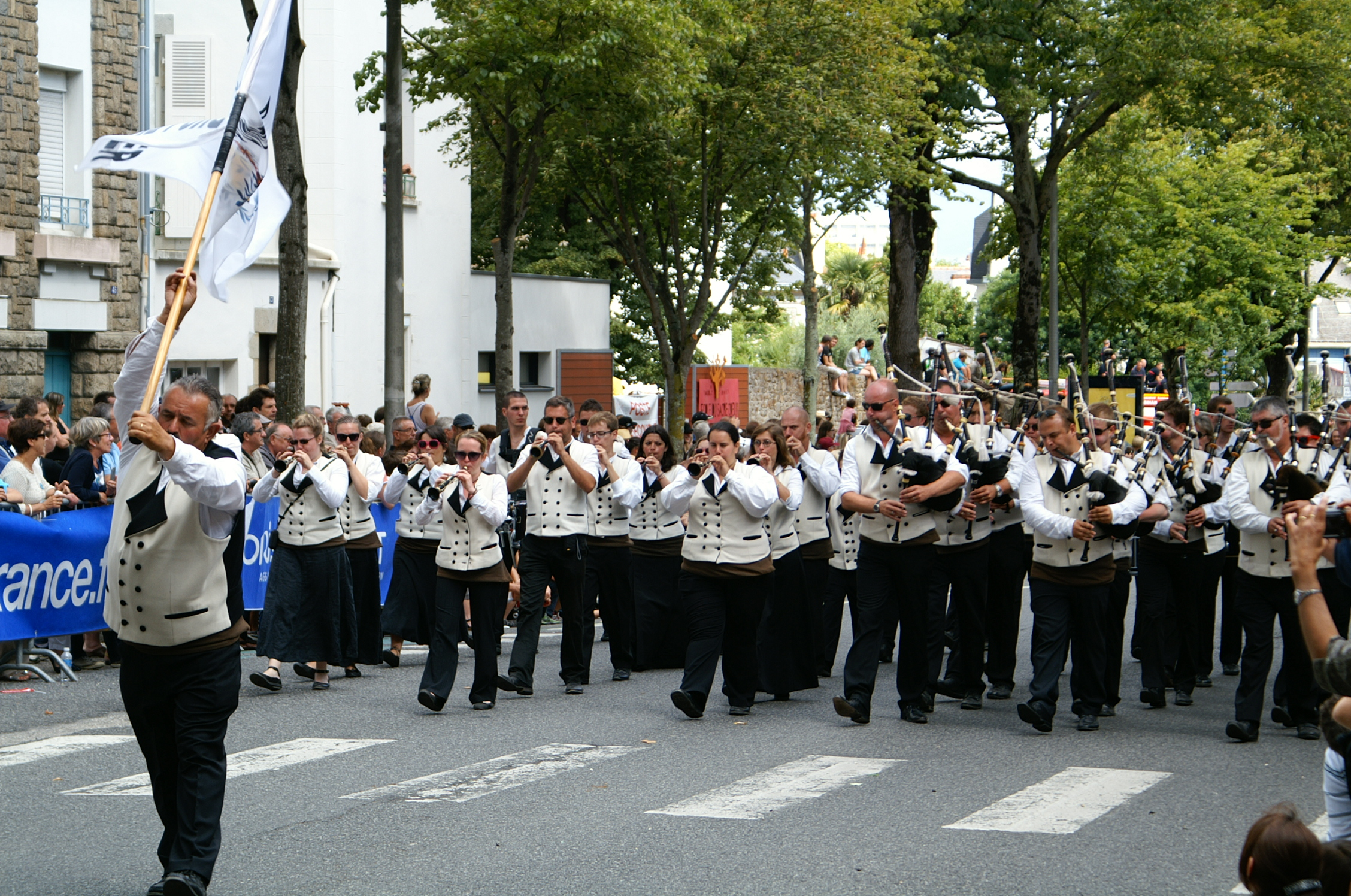 Le Bagad Bro Felger lors de la grande parade du festival interceltique de Lorient 2013